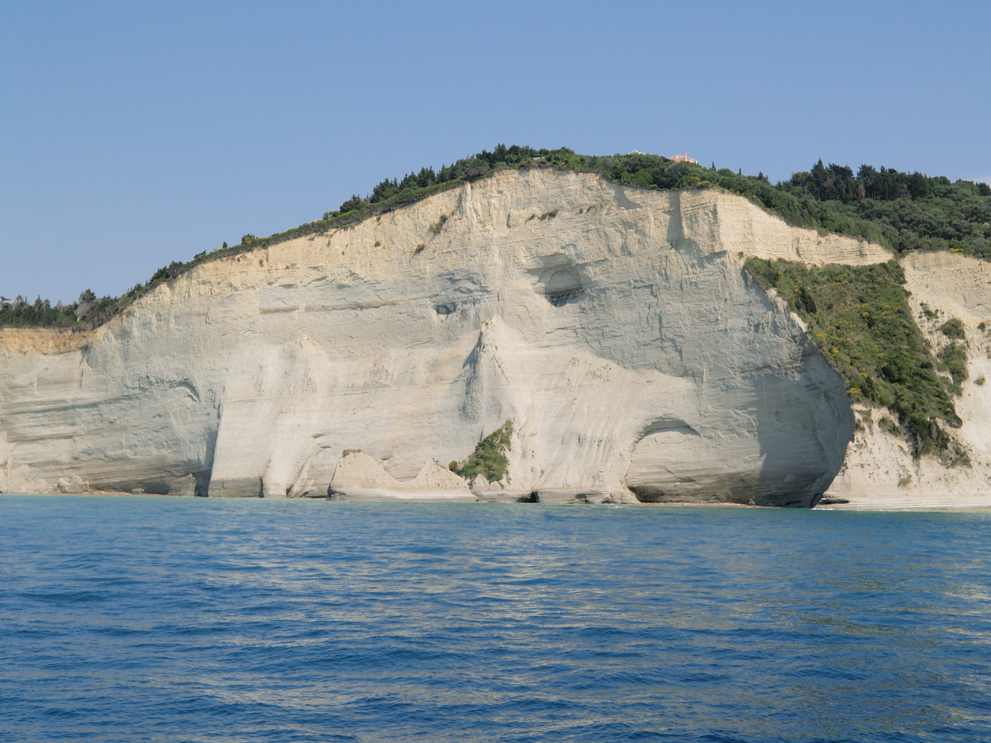 Sandstein-Steilküste im Norden der griechischen Insel Korfu zwischen Kap Drastis und Sidari